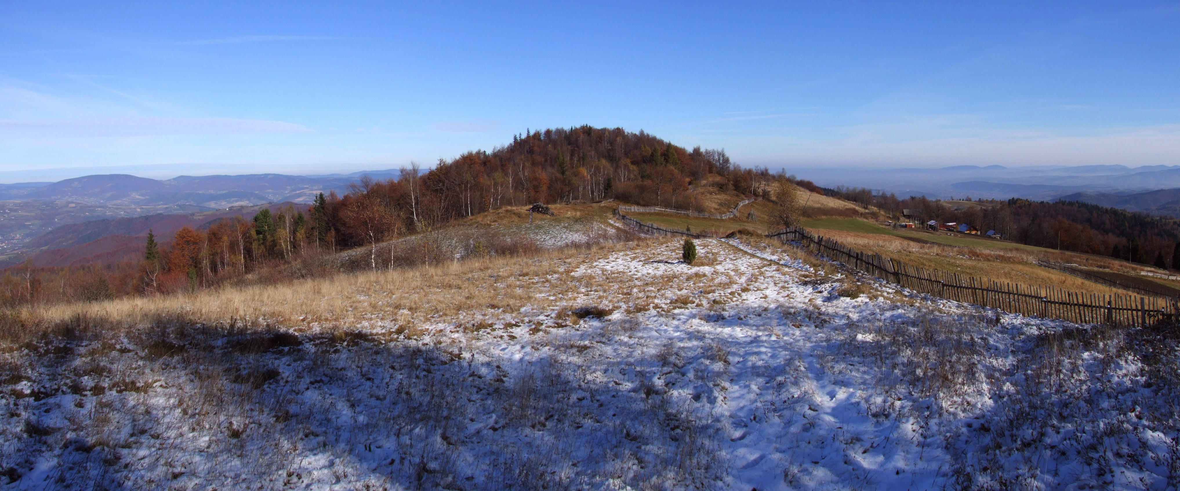 Koziarz w Paśmie Radziejowej i należacy do Obidzy przysiółek Wielga